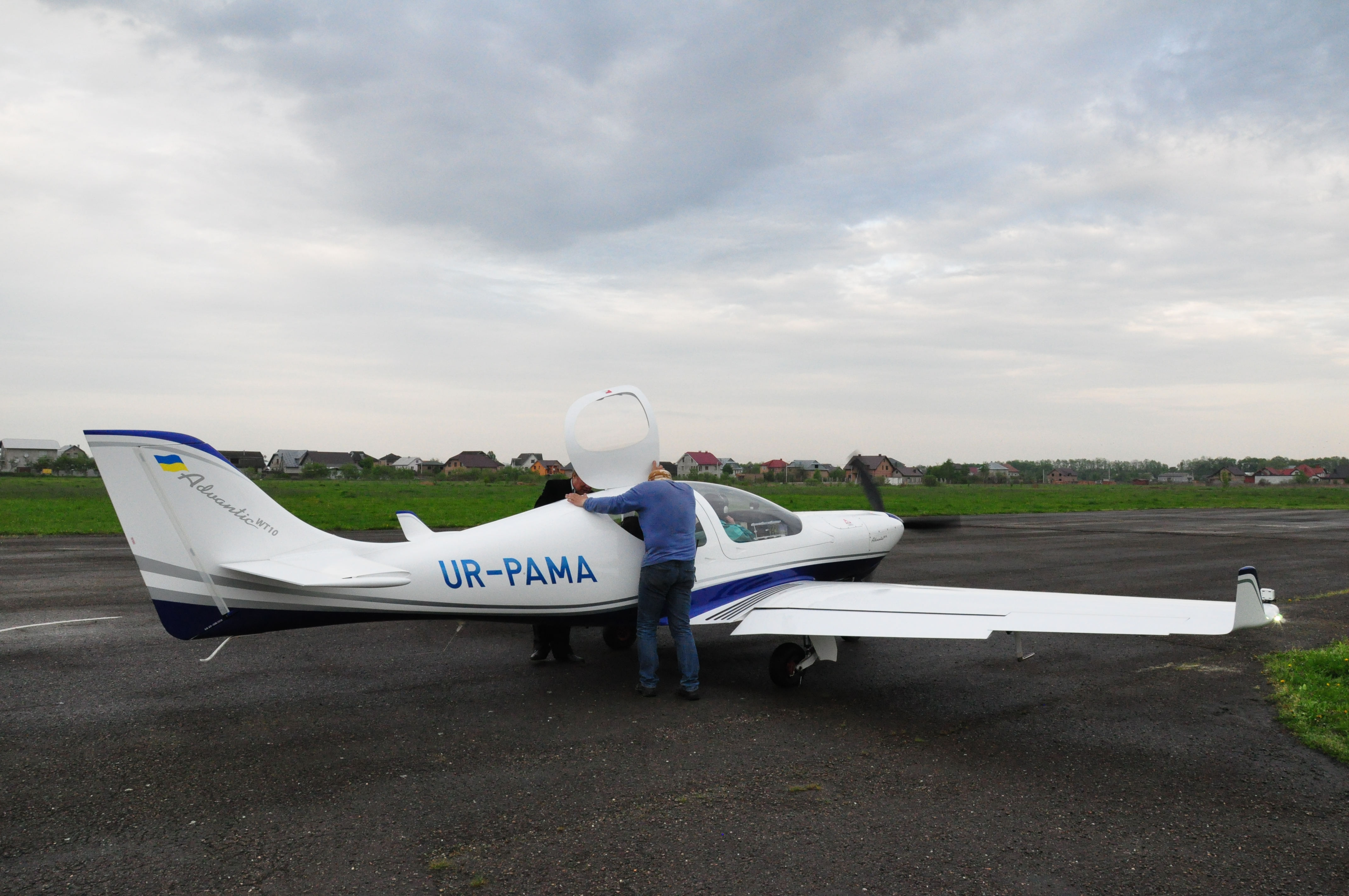 WT10 Advantic на спортивному аеродромі м. Коломия